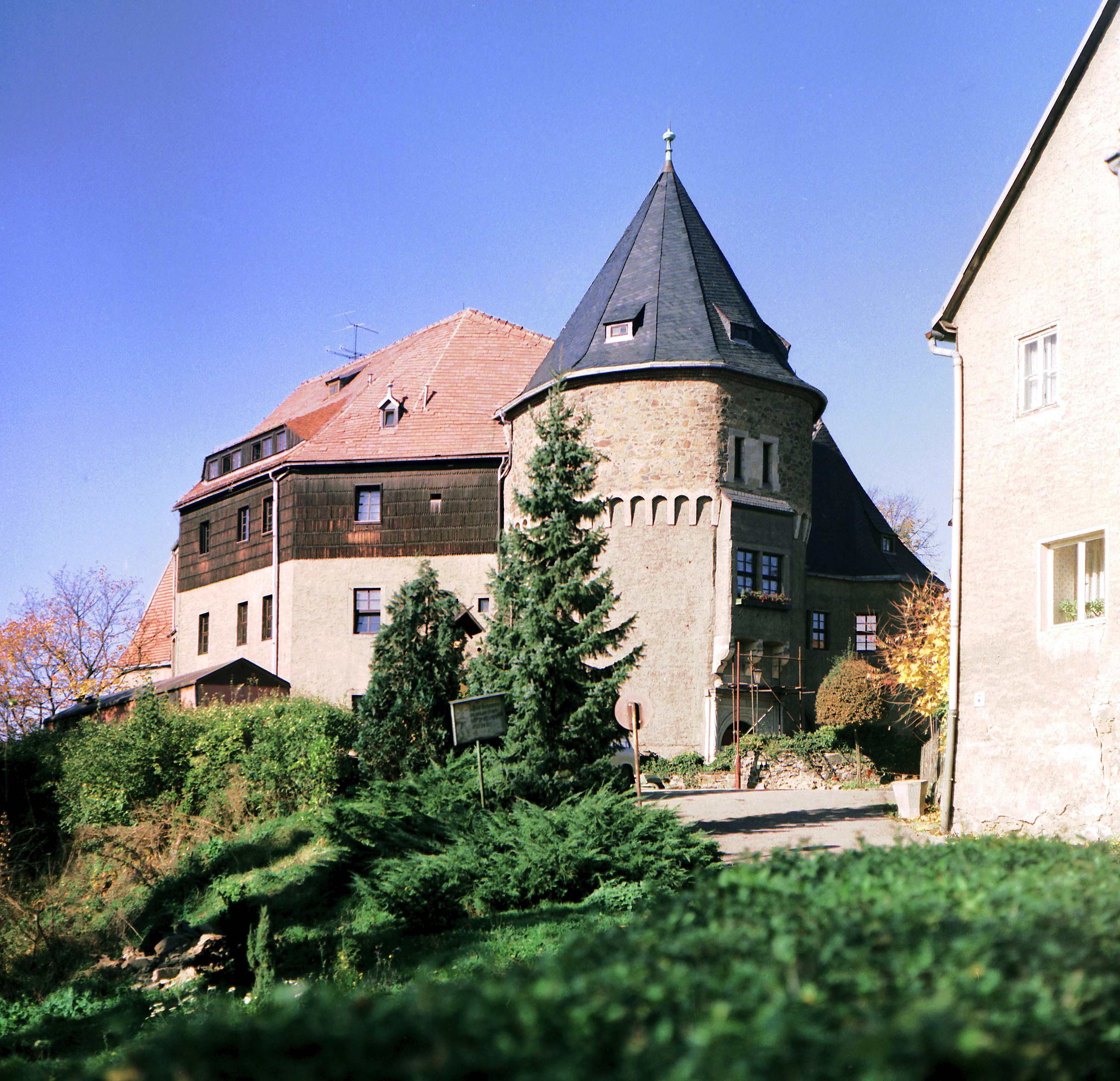 22.10.1989 9214 Reinsberg: Schloß Oberreinsberg. [19891015A14.JPG]19891022040NR.JPG(c)Blobelt